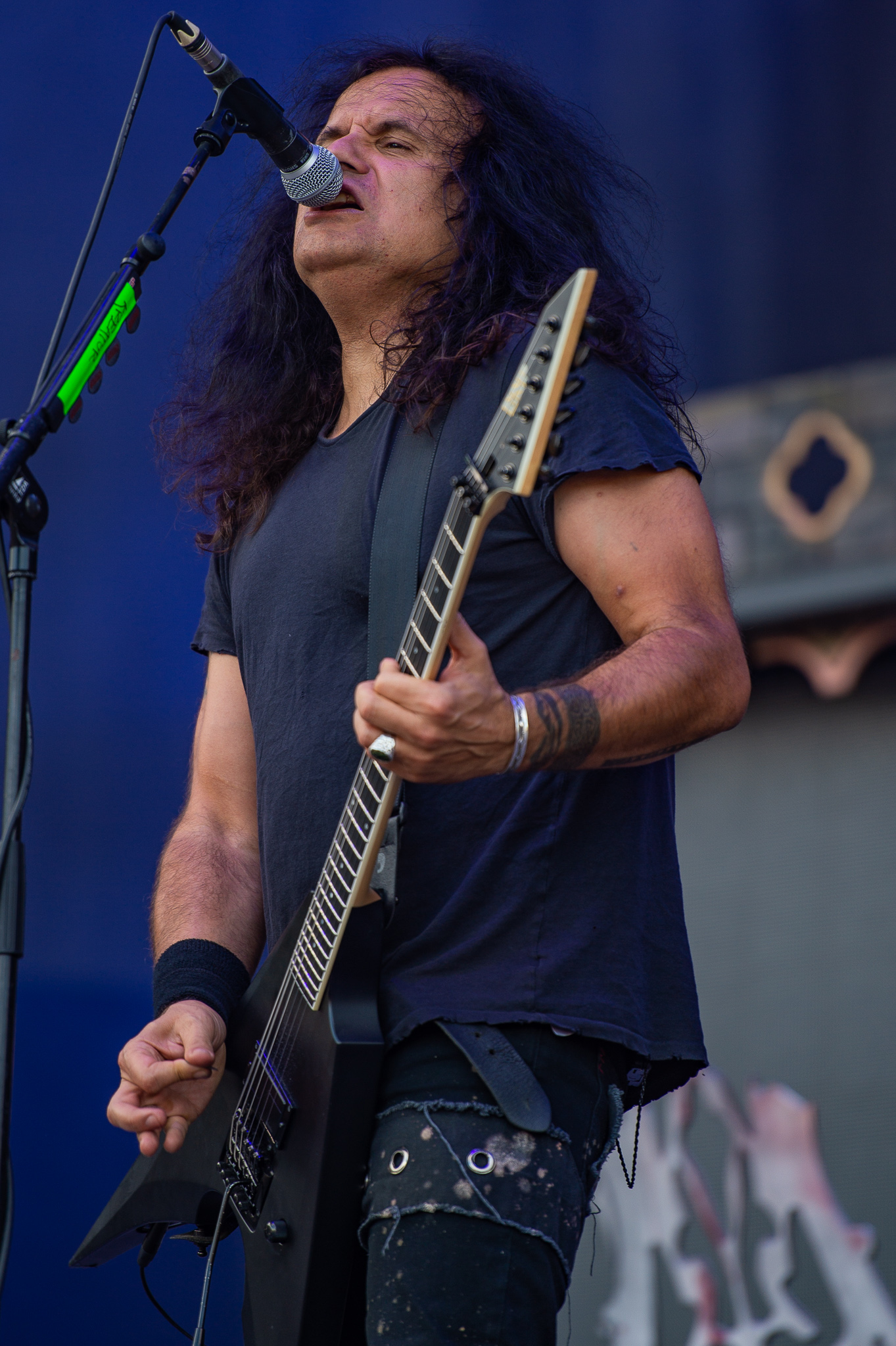 ARGO-Konzerte,Beck's Park Stage,Festival,Konzert,Kreator,Livekonzert,Livemusik,Mille Petrozza,Musik,RiP,Rock im Park 2018